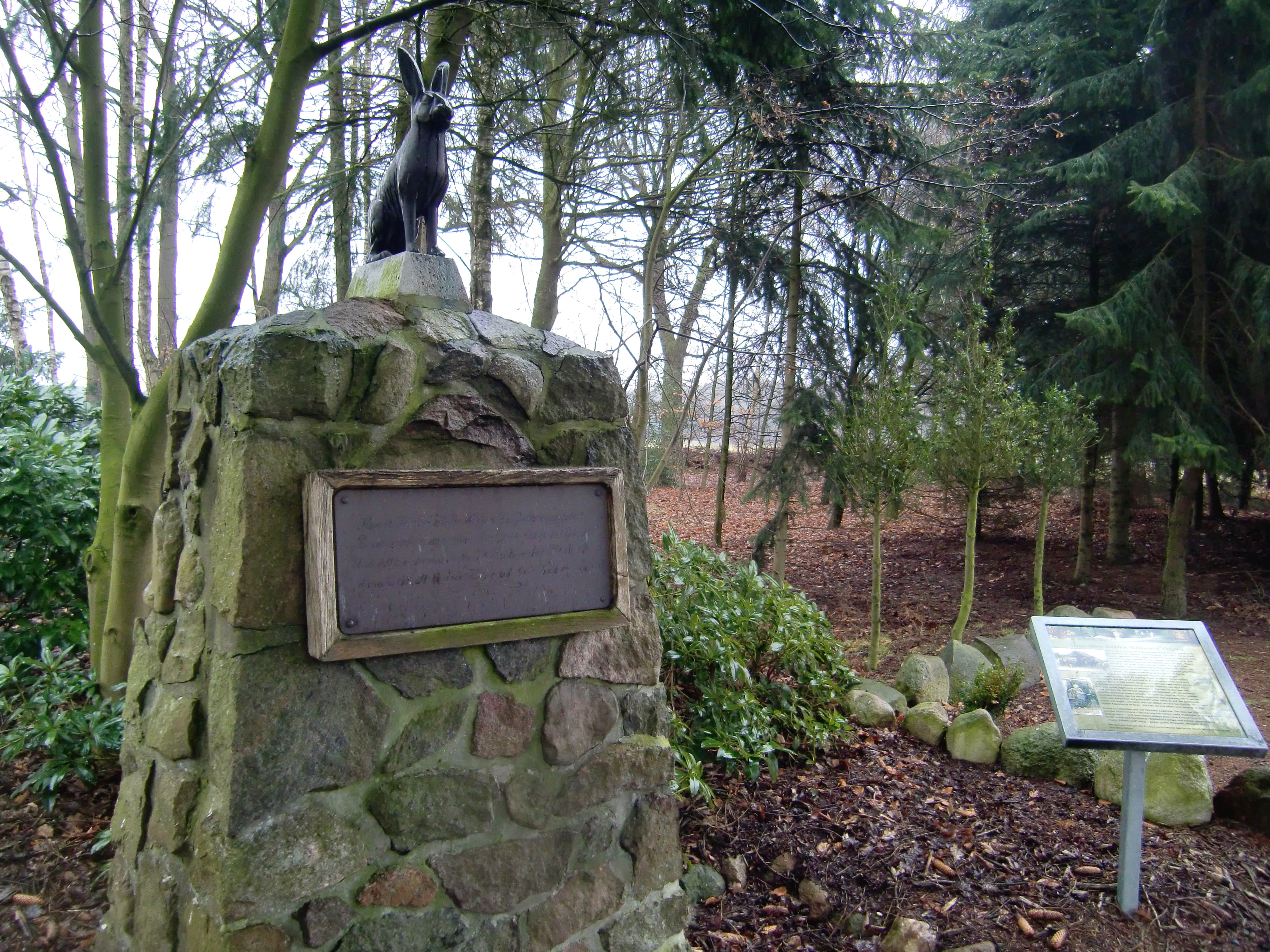 Hasen-Ahlers Denkmal mit Erläuterungstafel in Feldhake bei Klattenhof.